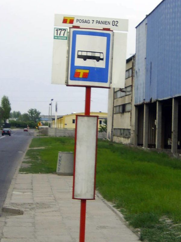 Posag 7 Panien - Przystanek autobusowy, Warszawa